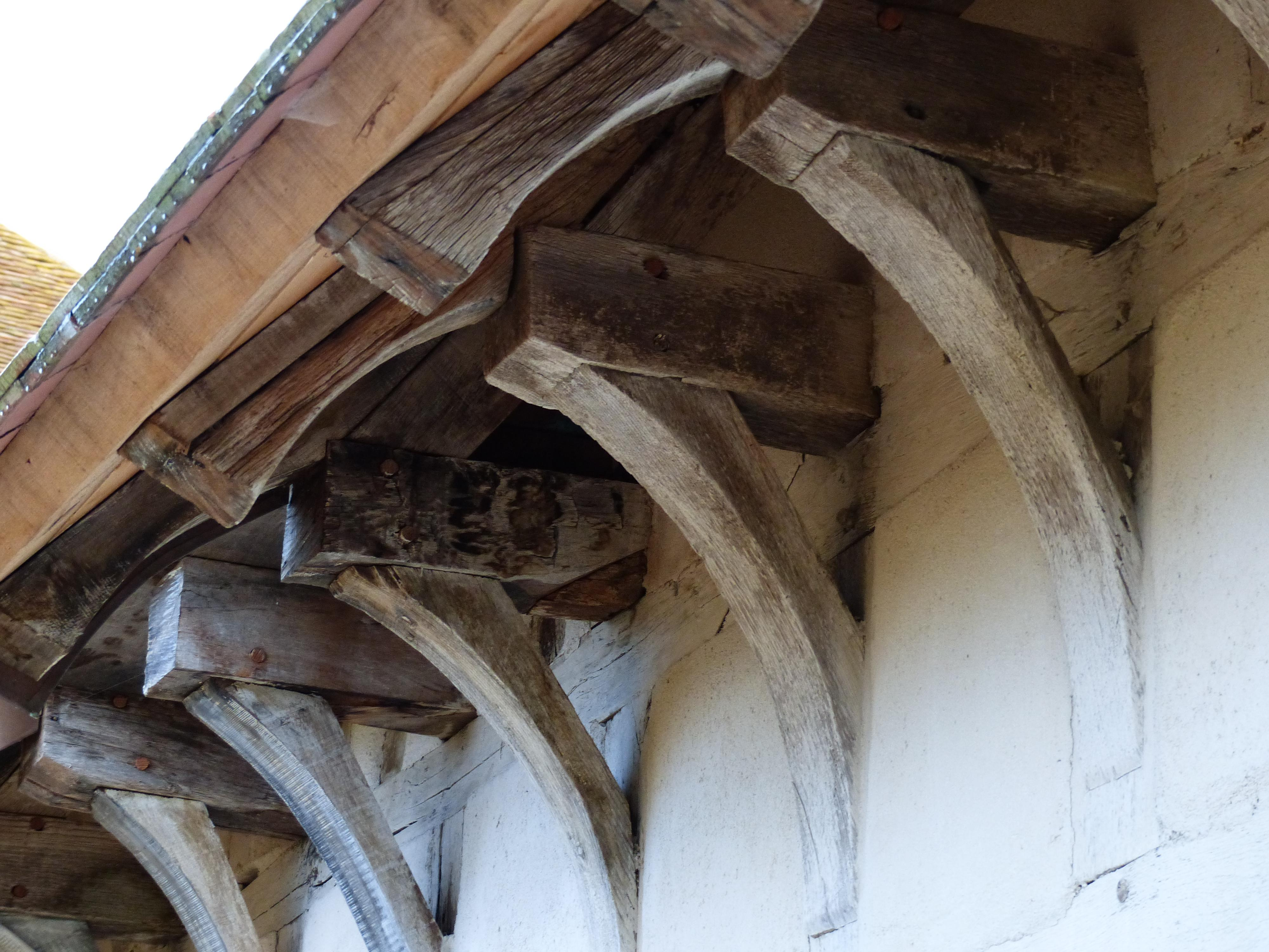 Neuglise (hameau et ancienne paroisse dépendant de la commune de Bessay-sur-Allier, Allier, France). Maison à pans de bois en fin de restauration en 2014. Maison du XVIIe siècle classée Monument historique en 1988. Détail de la charpente ancienne.